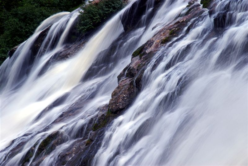 Bild des Grawa Wasserfalls im Stubaital